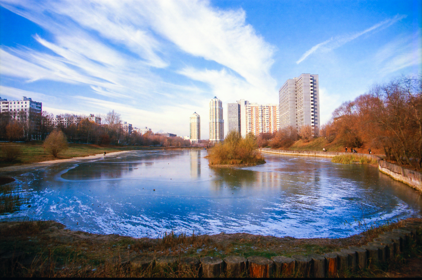 Удальцовские пруды Kodak Ektar Tamron 19-35/19mm NikonF90s